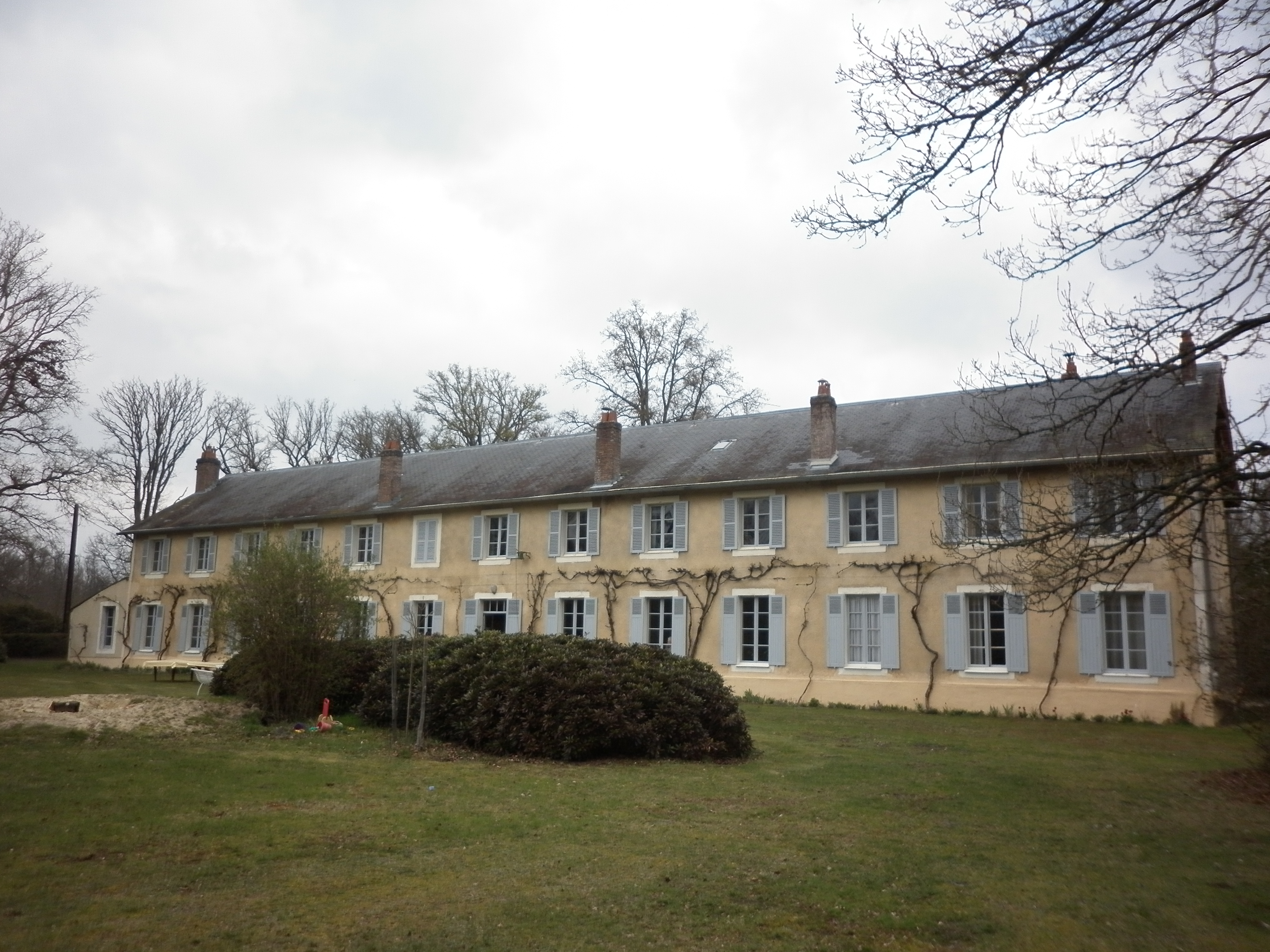 Le bâtiment principal (celui des repas communs, notamment) de La Colonie fouriériste de Condé-sur-Vesgre (Yvelines)